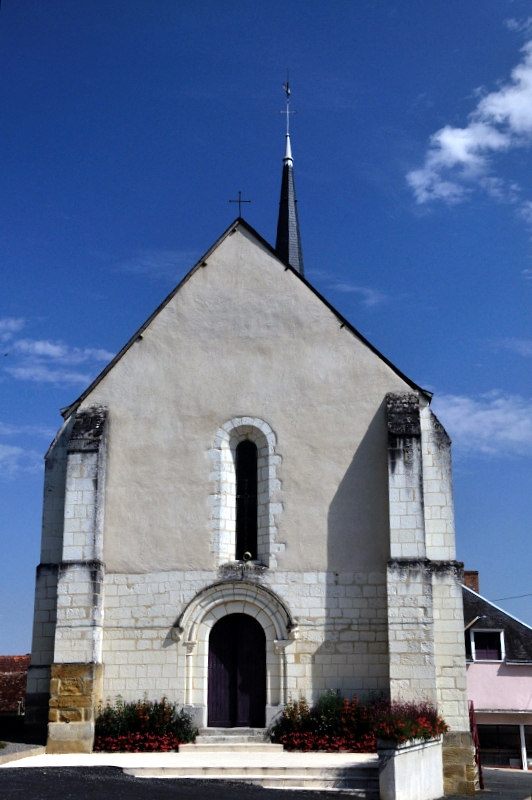 Eglise Saint-Etienne - Géhée (Indre)